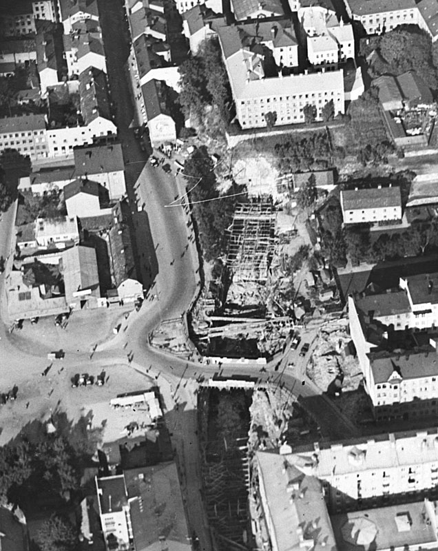 Flygbild över Götgatan vid Södra Bantorget (nuvarande Medborgarplatsen).